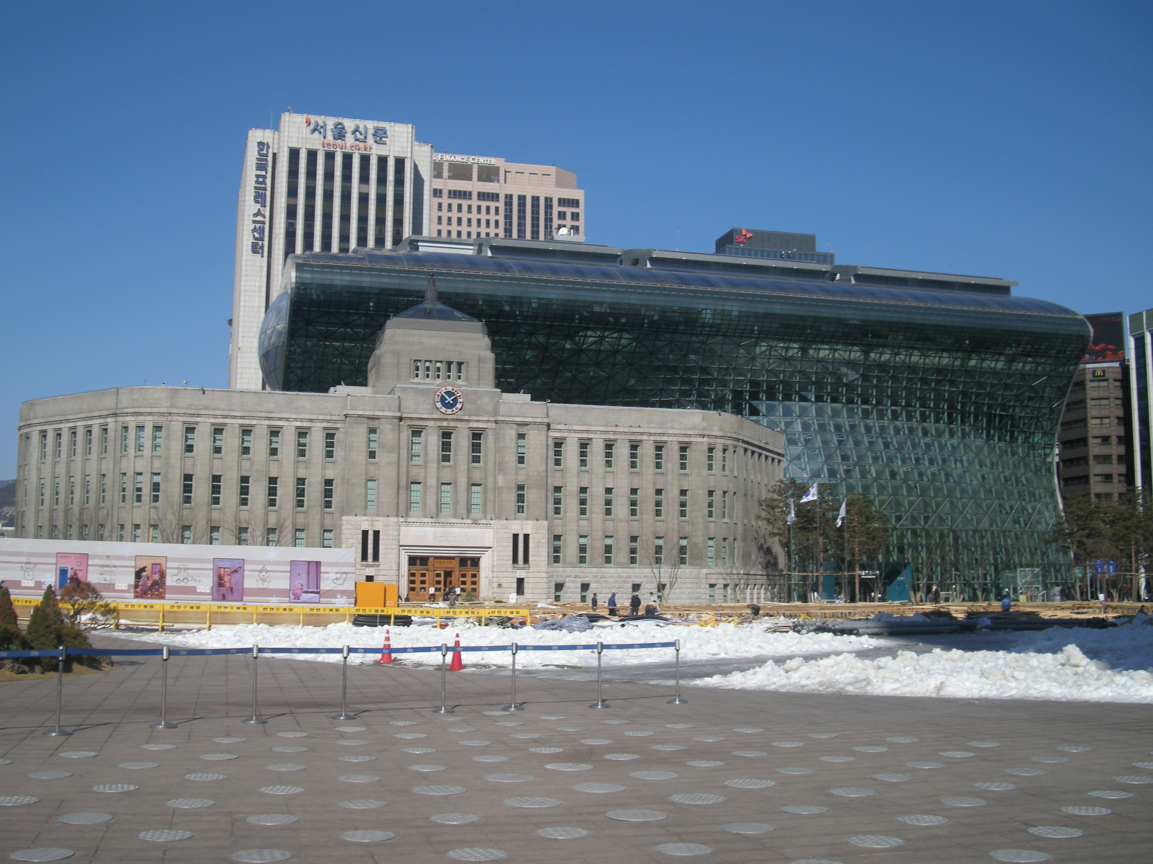 서울도서관과 서울특별시청